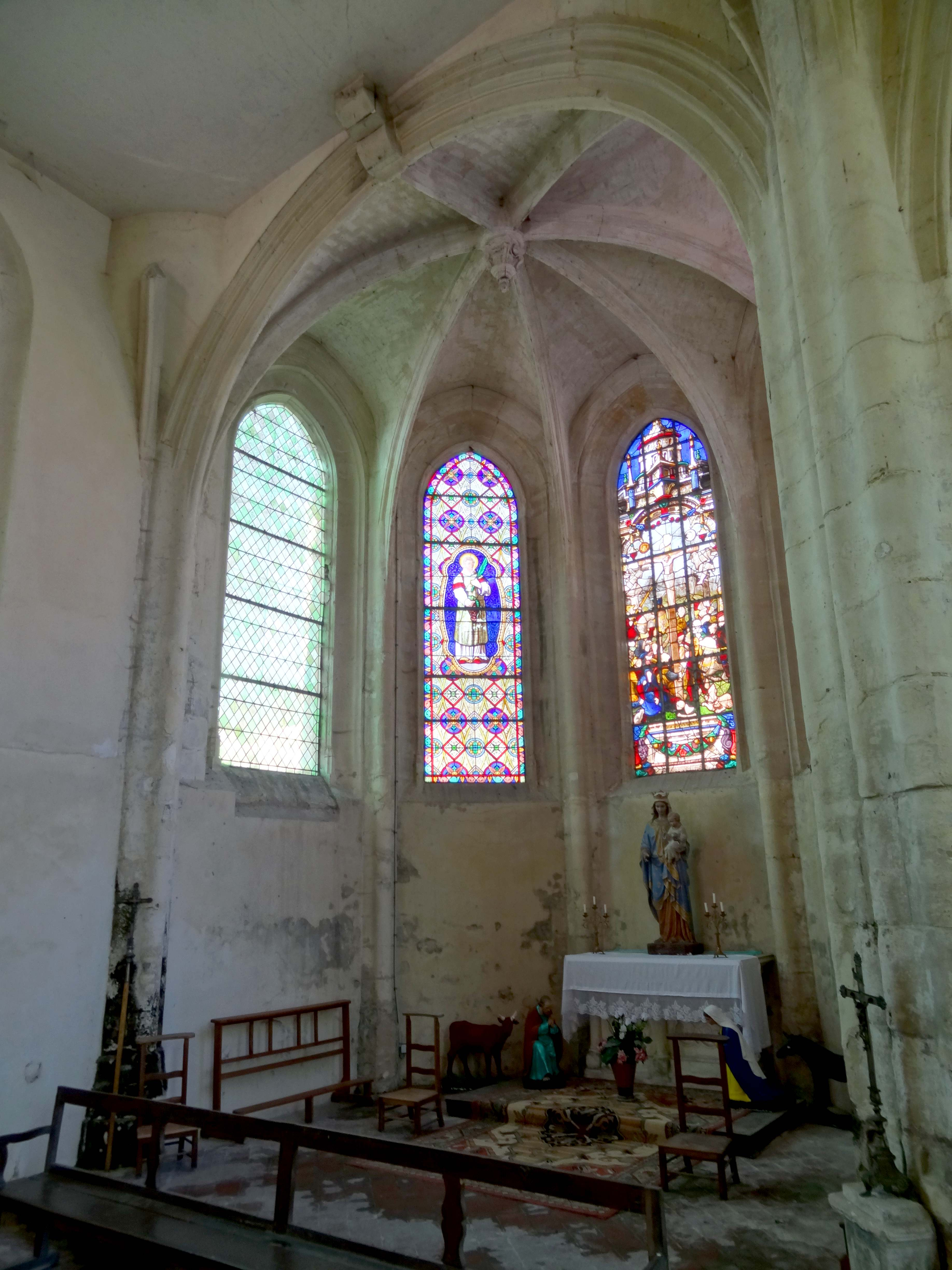 Intérieur de l'église - voir titre.